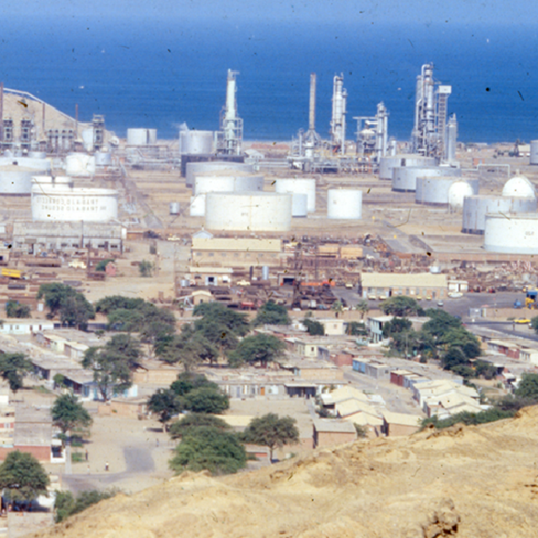 La Ciudad de Talara en 1945